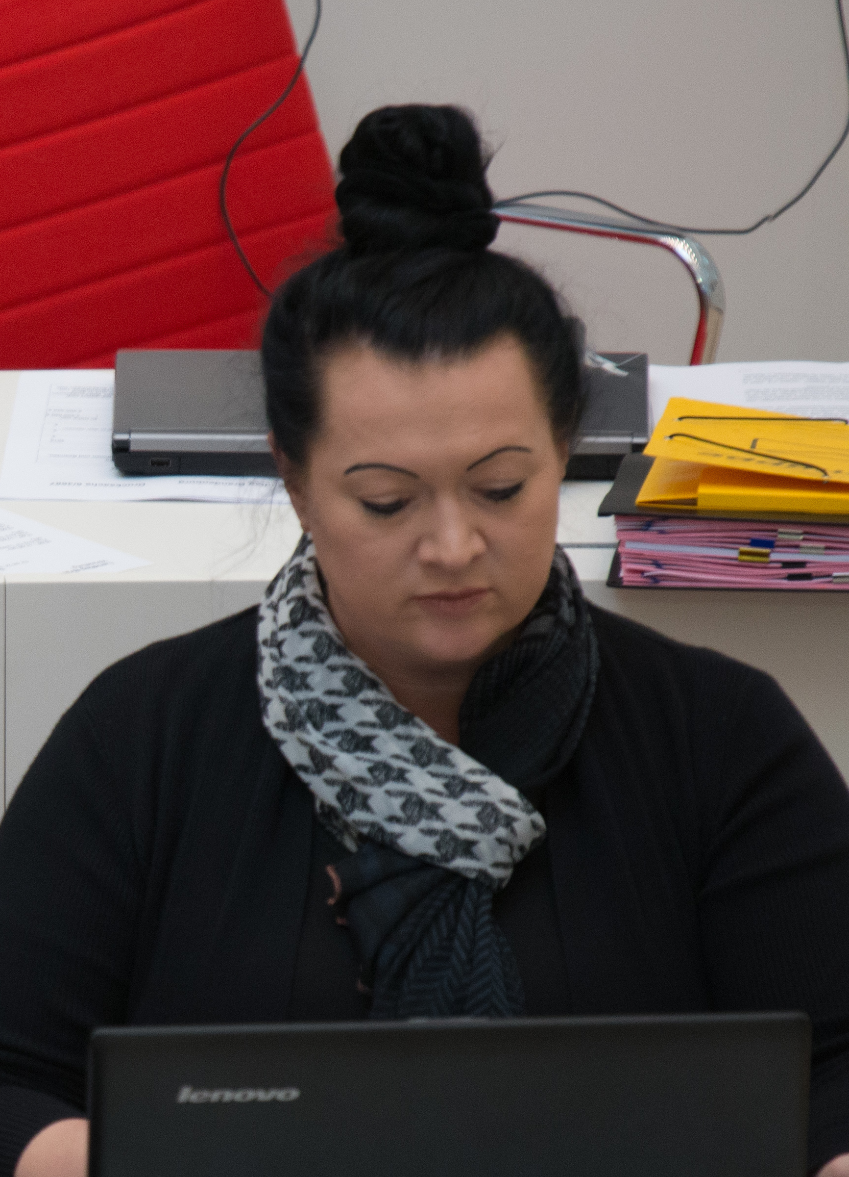 Impressionen aus der Plenarsitzung vom 9. März 2016 des Landtages Brandenburg